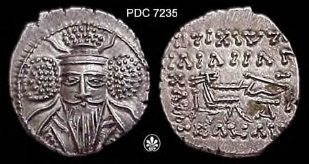 Münze des Vologase